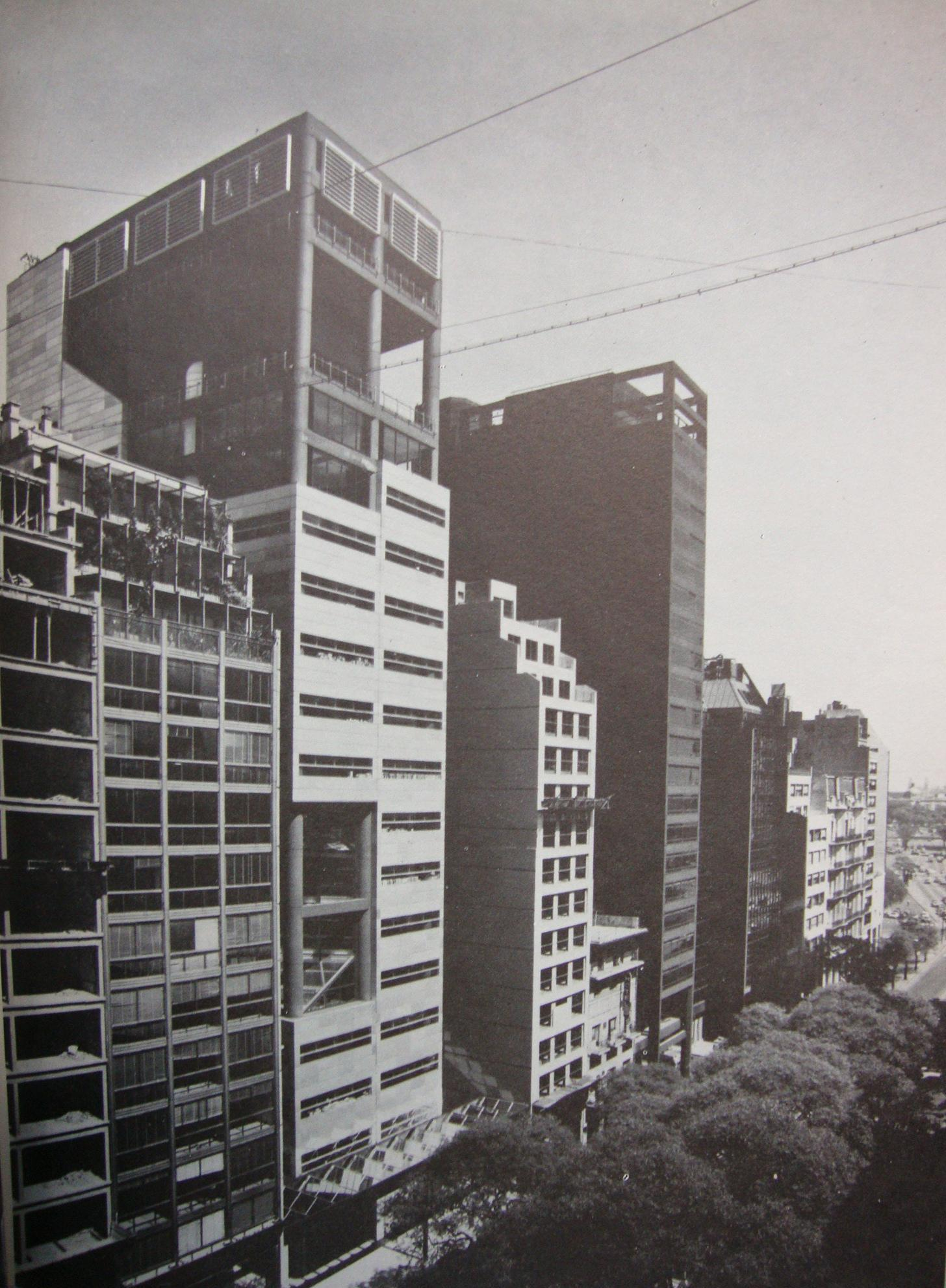 Vista de la Avenida Leandro N. Alem entre las calles Viamonte y Tucumán, de sur a norte. Se destaca la Torre CASFPI (Alem 651), hoy sede del Ministerio de Trabajo de la Nación.